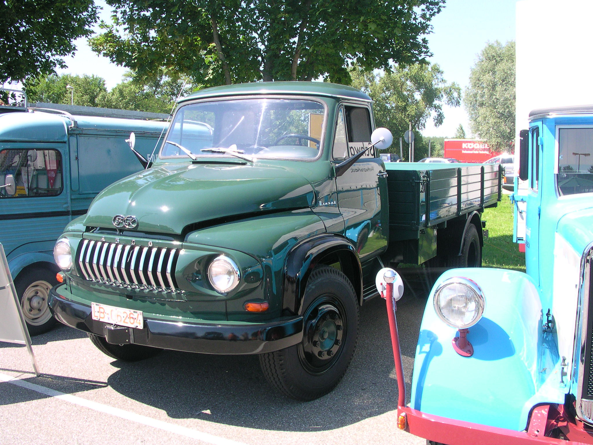 LKW von Ford Köln mit Zweitakt-Diesel-Motor in Wörth am Rhein beim Oldtimer-Treffen bei Daimler-Chrysler